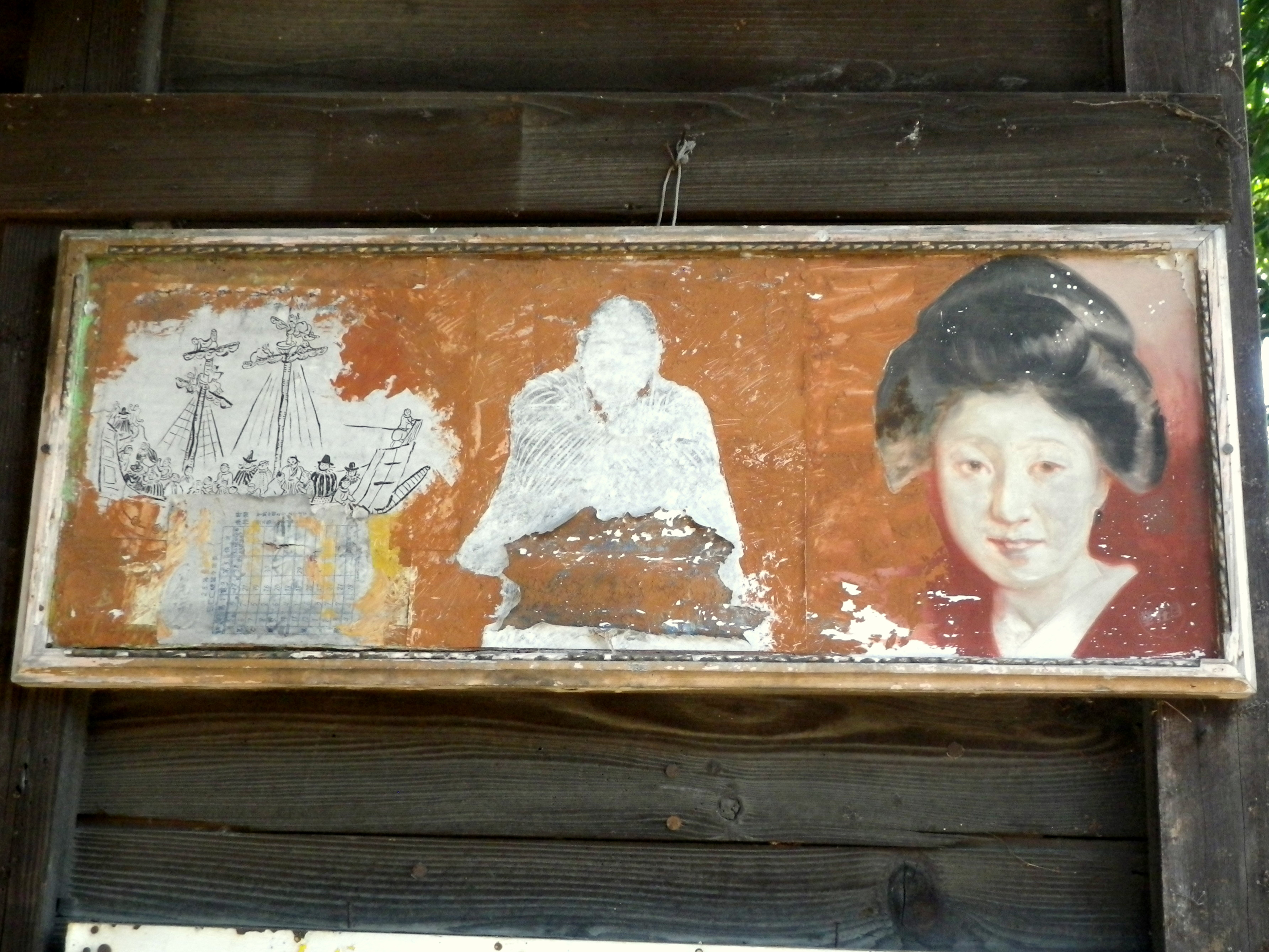 朝日神社（仙台市青葉区上杉）に飾ってある仙台四郎の絵。